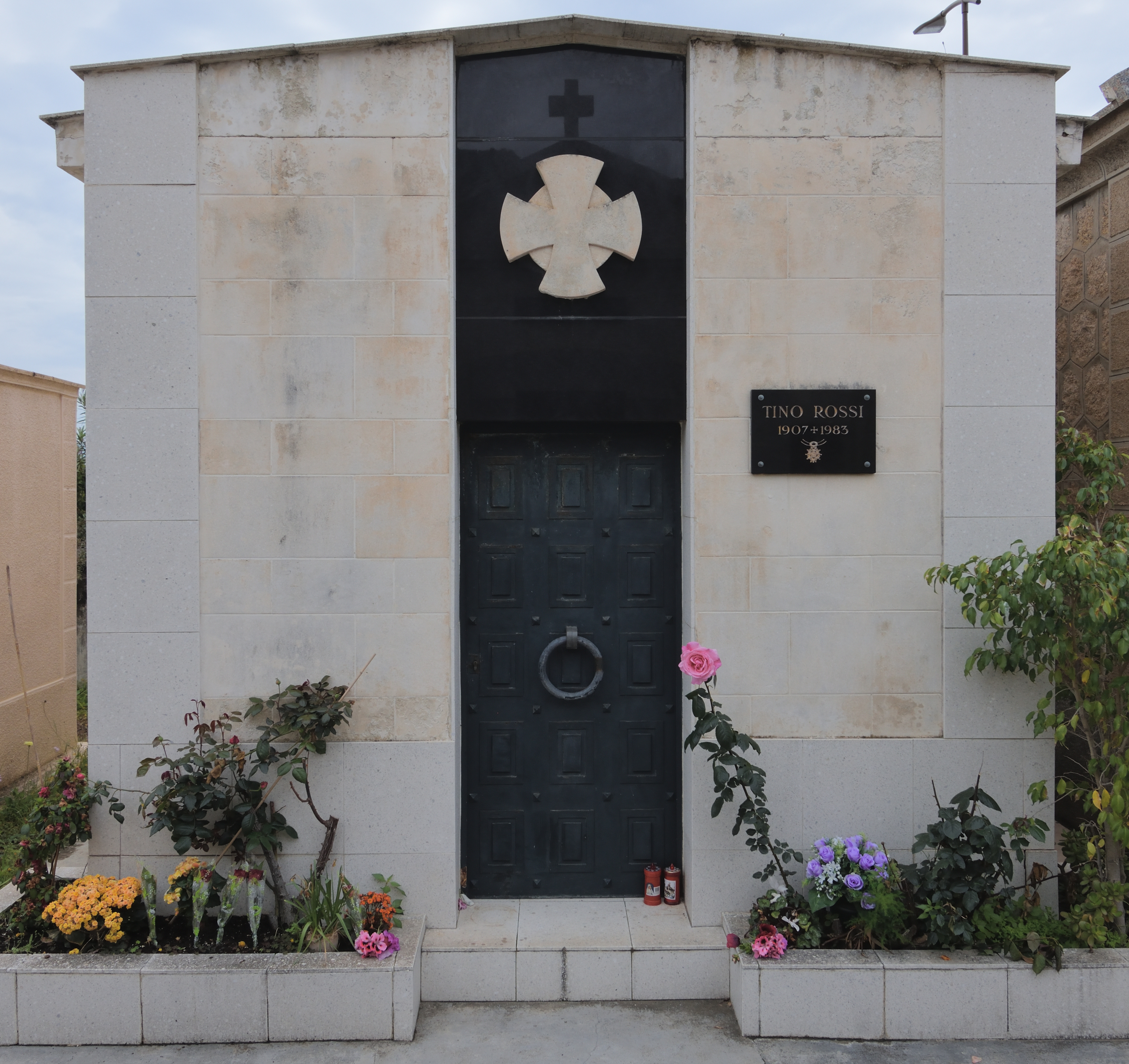 Tombeau de Tino Rossi dans le cimetière d`Ajaccio